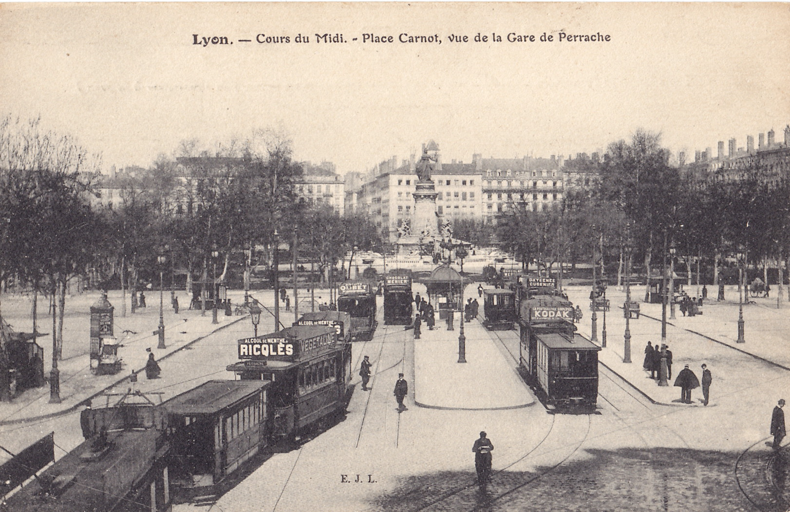 Carte postale ancienne éditée par EJL : LYON - Cours du Midi - Place Carnot, vue de la Gare de Perrache